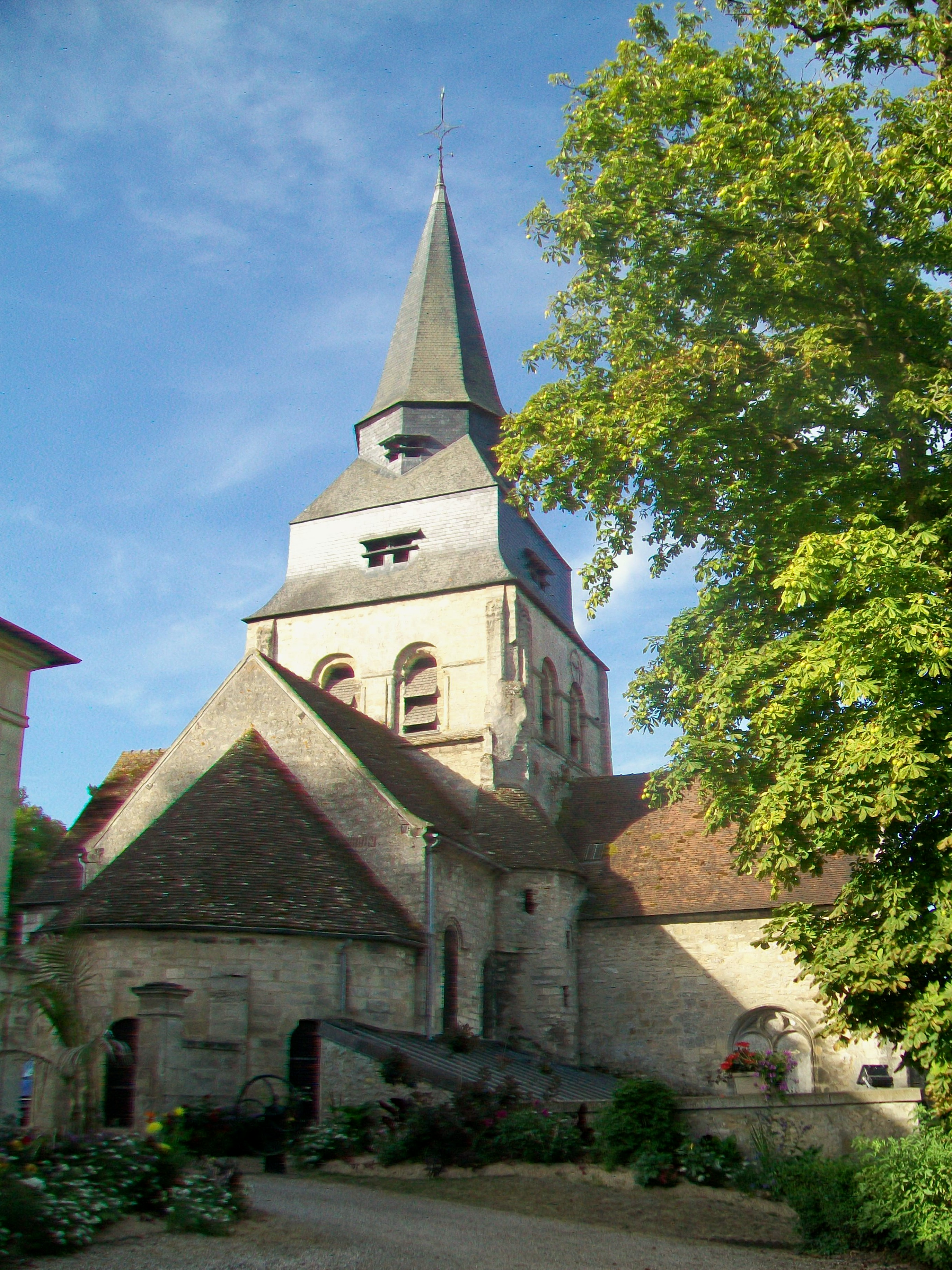 La façade est ; vue depuis la place devant la mairie.